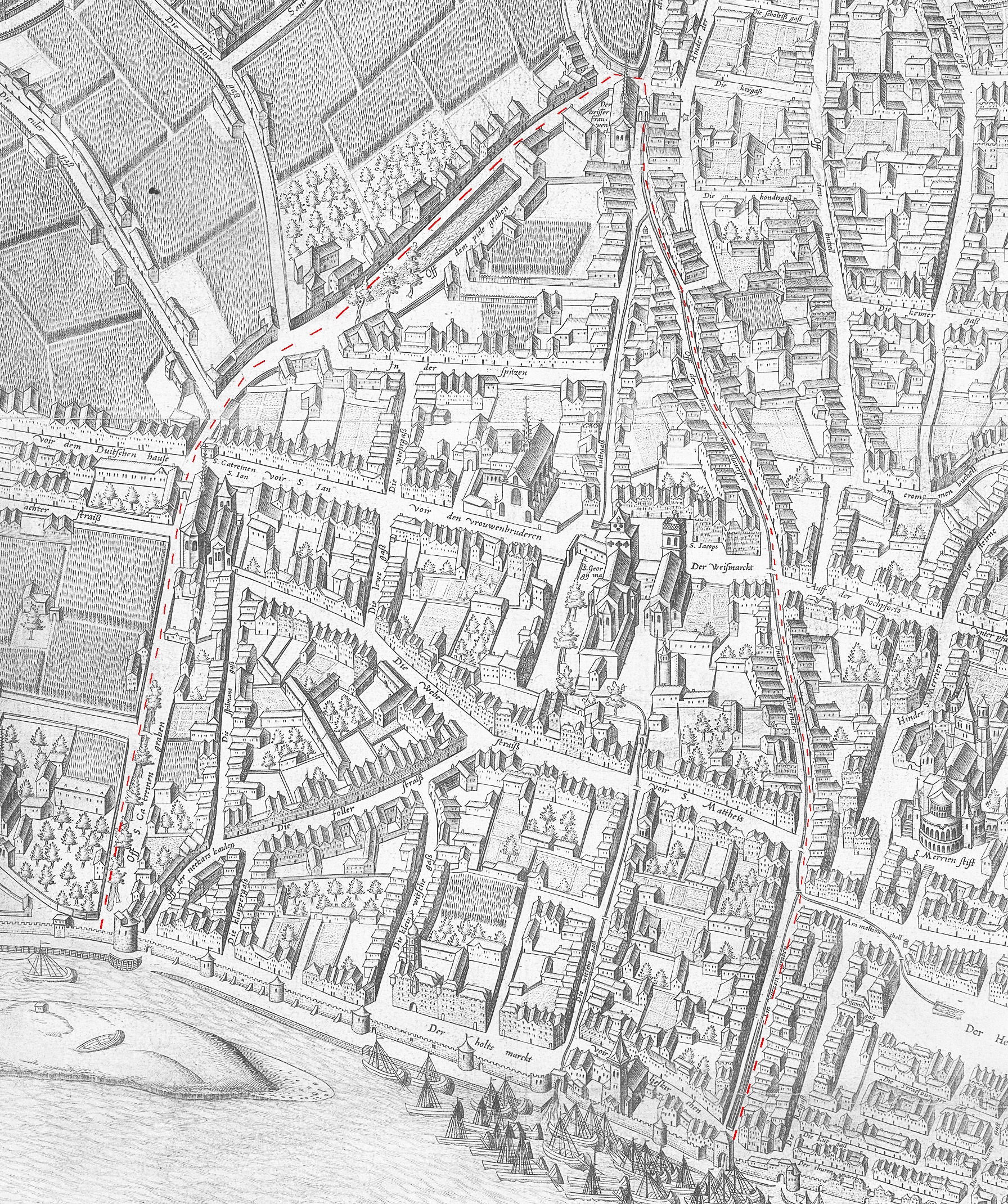 Ausschnitt des Mercator – Stadtplanes Köln. Bereich „Oversburg/Airsbach" mit Markierung der Bezirksgrenze